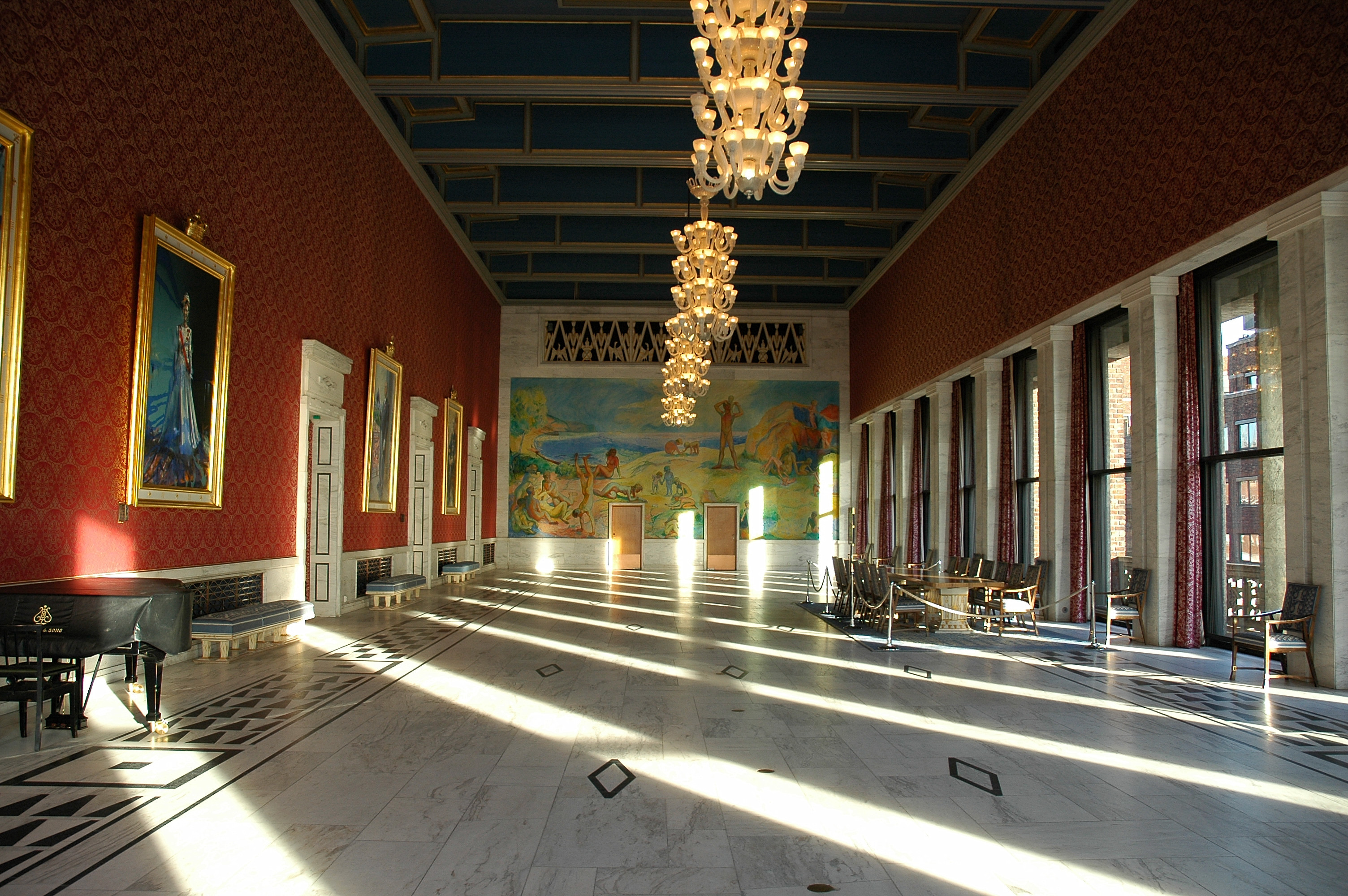 Bankettsalen, Oslo city hall